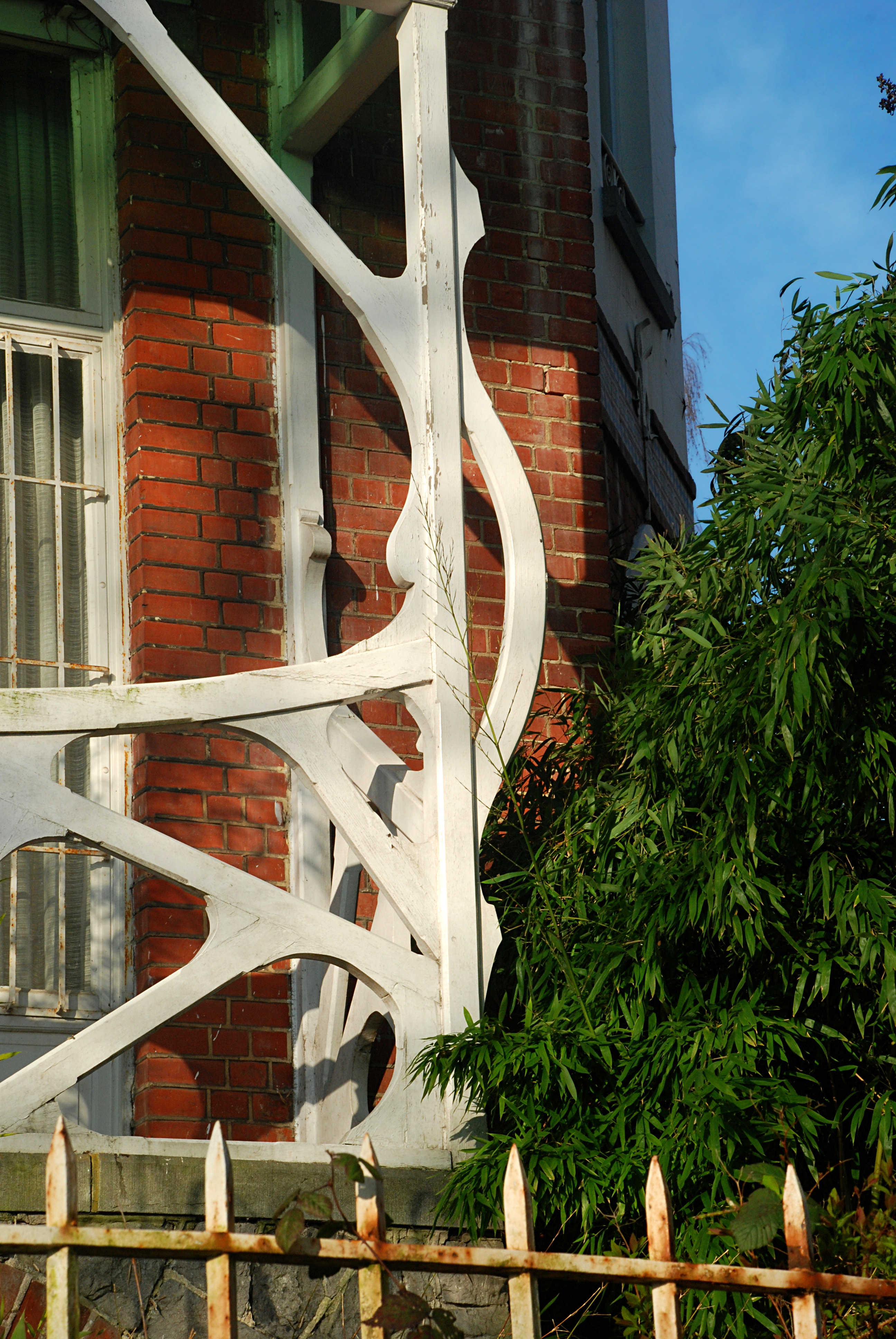 Belgique - Bruxelles - Watermael - William Jelley - Villa Art nouveau - Avenue des Taillis 11 - Détail du balcon